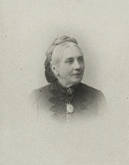 Мария Александровна Паткуль, урождённая де Траверсе (1822-1900)